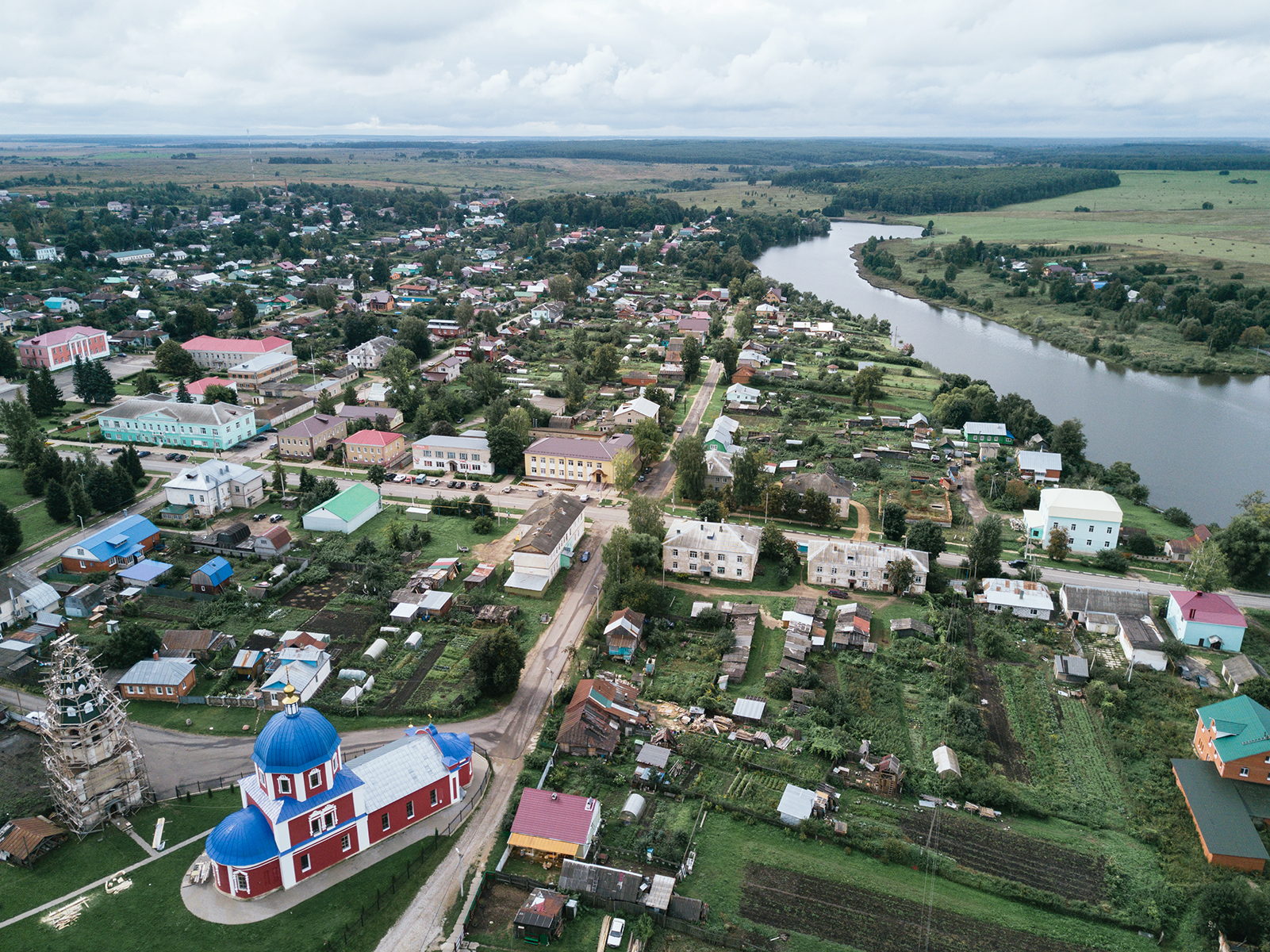 Мещовск с высоты птичьего полёта. Хорошо виден Благовещенский собор